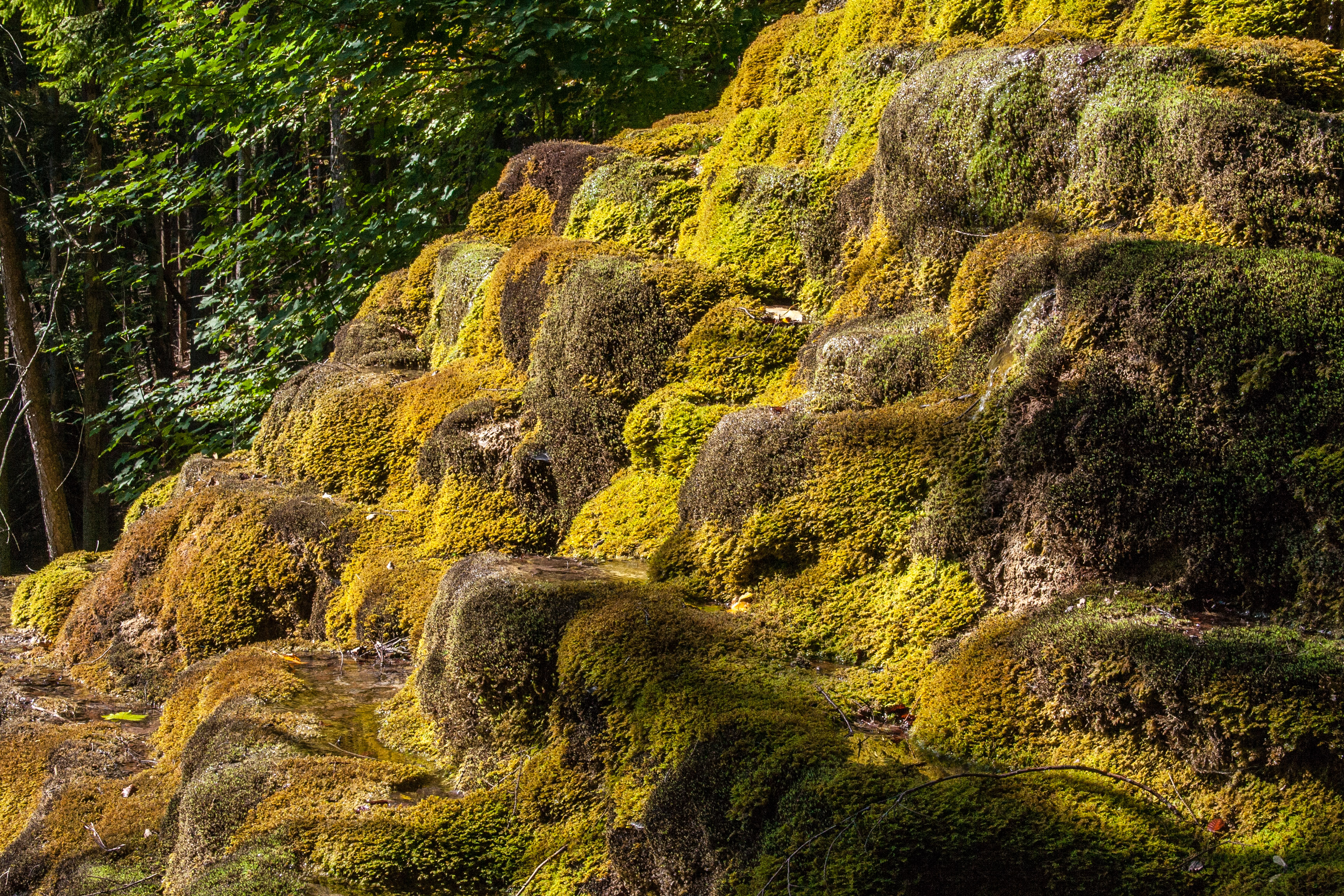 Sinterterassen "Hoher Brunnen" bei Berching